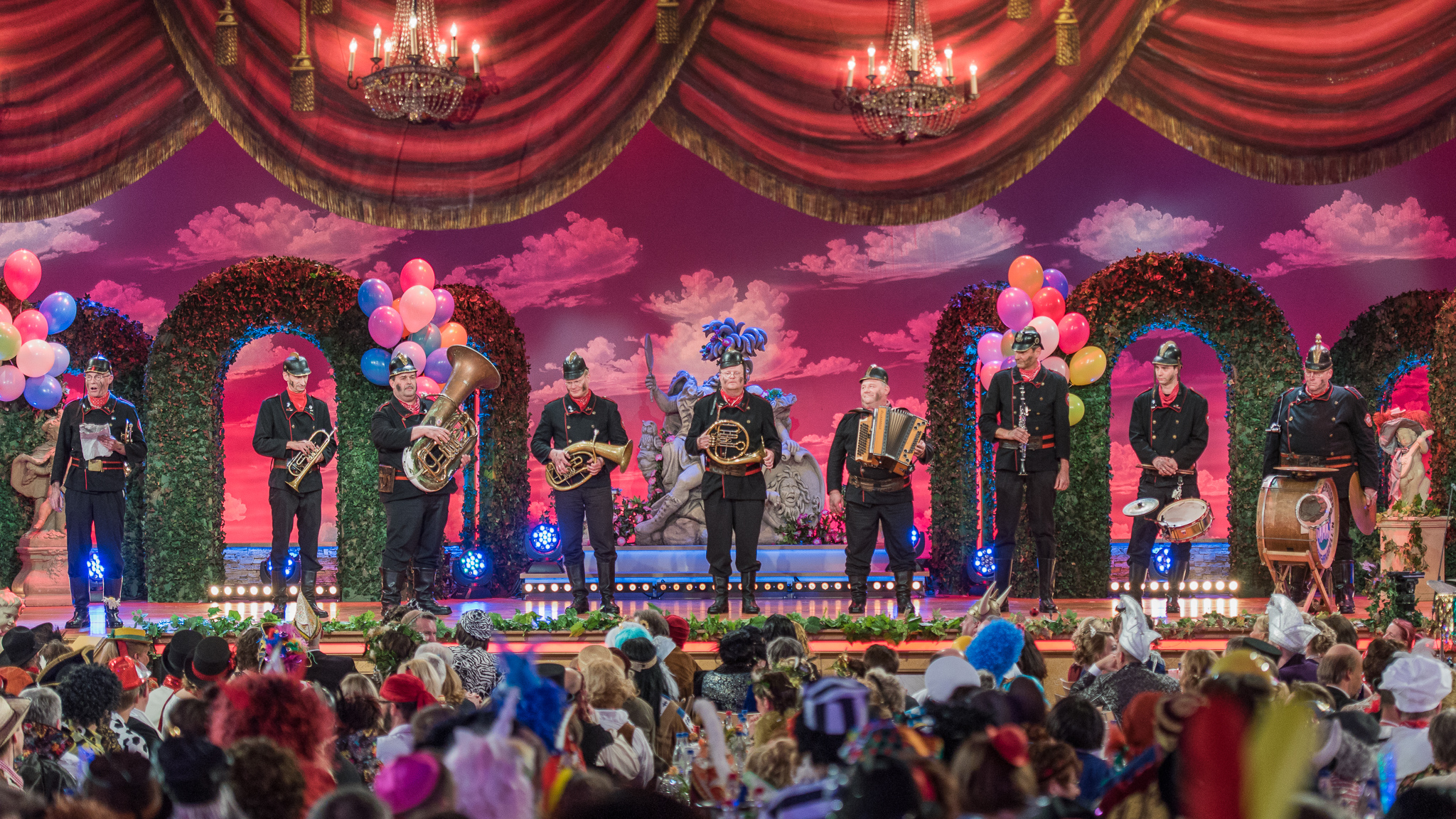 Altneihauser Feierwehrkapell’n,BR,Bayerisches Fernsehen,Fastnacht in Franken,Fastnachts-Verband Franken,Karneval,Live-Sendung,Mainfrankensäle